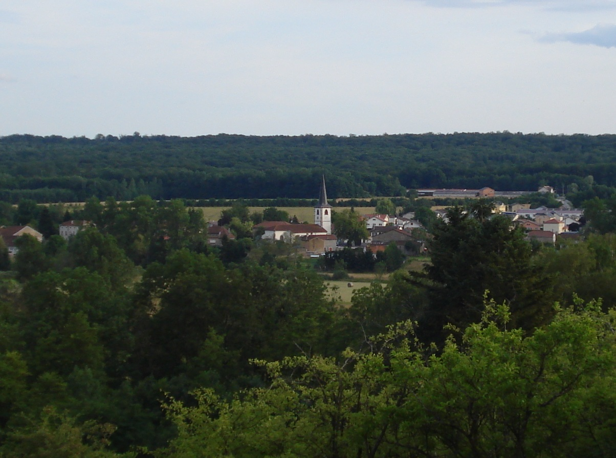 Vue de Bénaménil depuis la colline du poste de secours de Domjevin